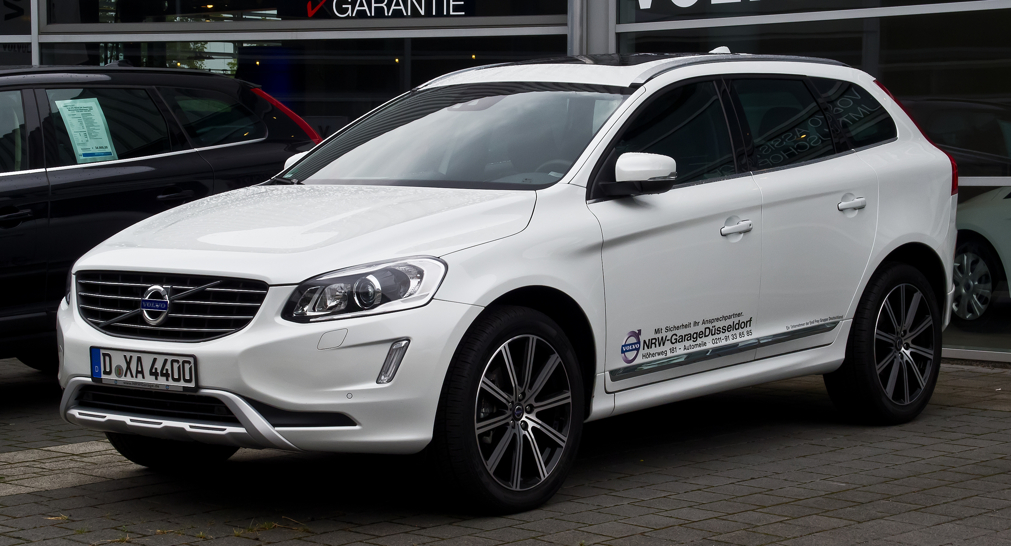 Volvo XC60 D5 AWD Summum (Facelift)